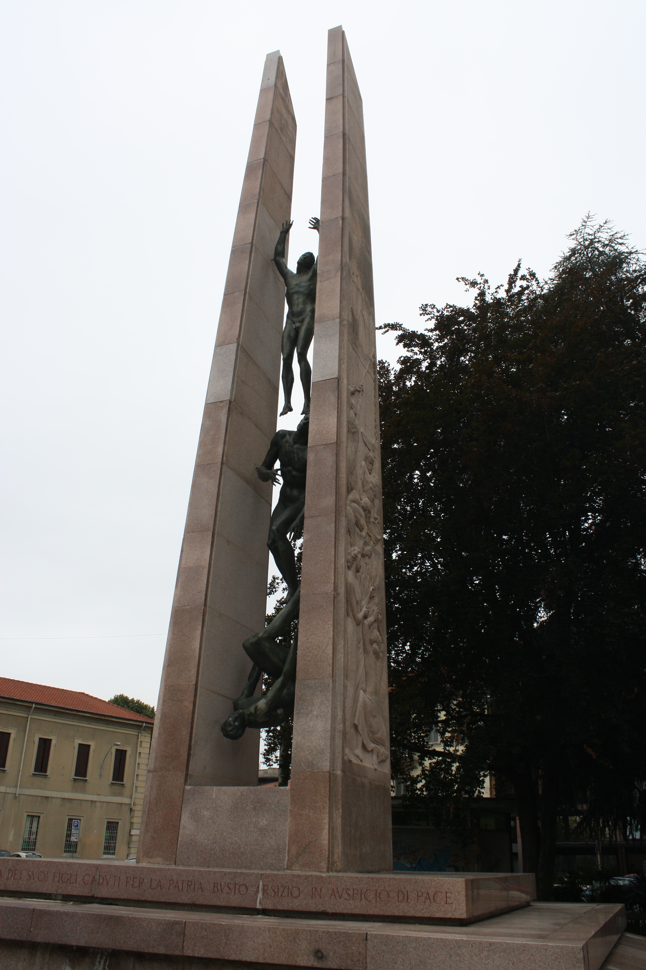 Monumento ai Caduti This is a photo of a monument which is part of cultural heritage of Italy.